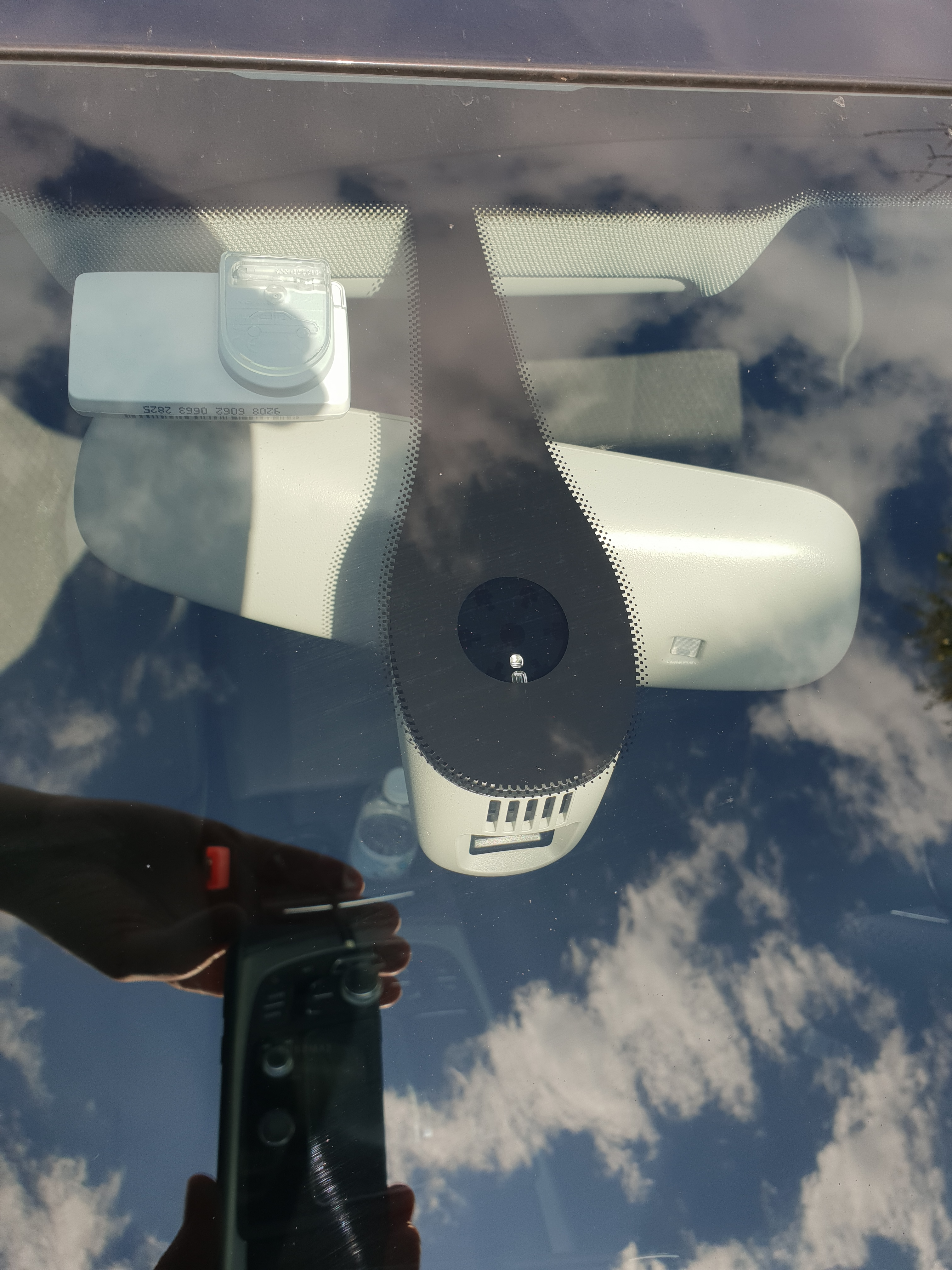 Regnsensor på en Audi